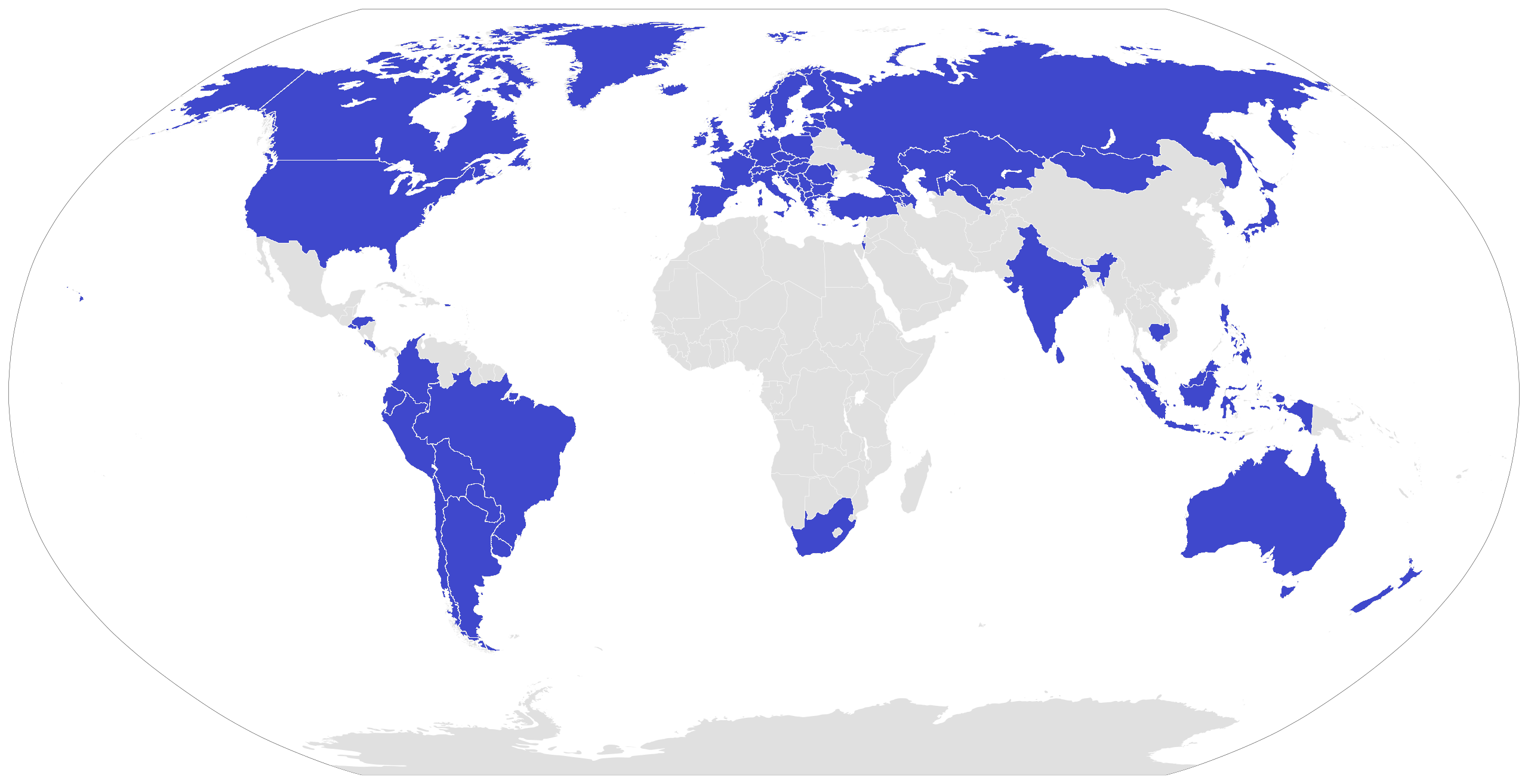 adoption of the standard ISO 45001